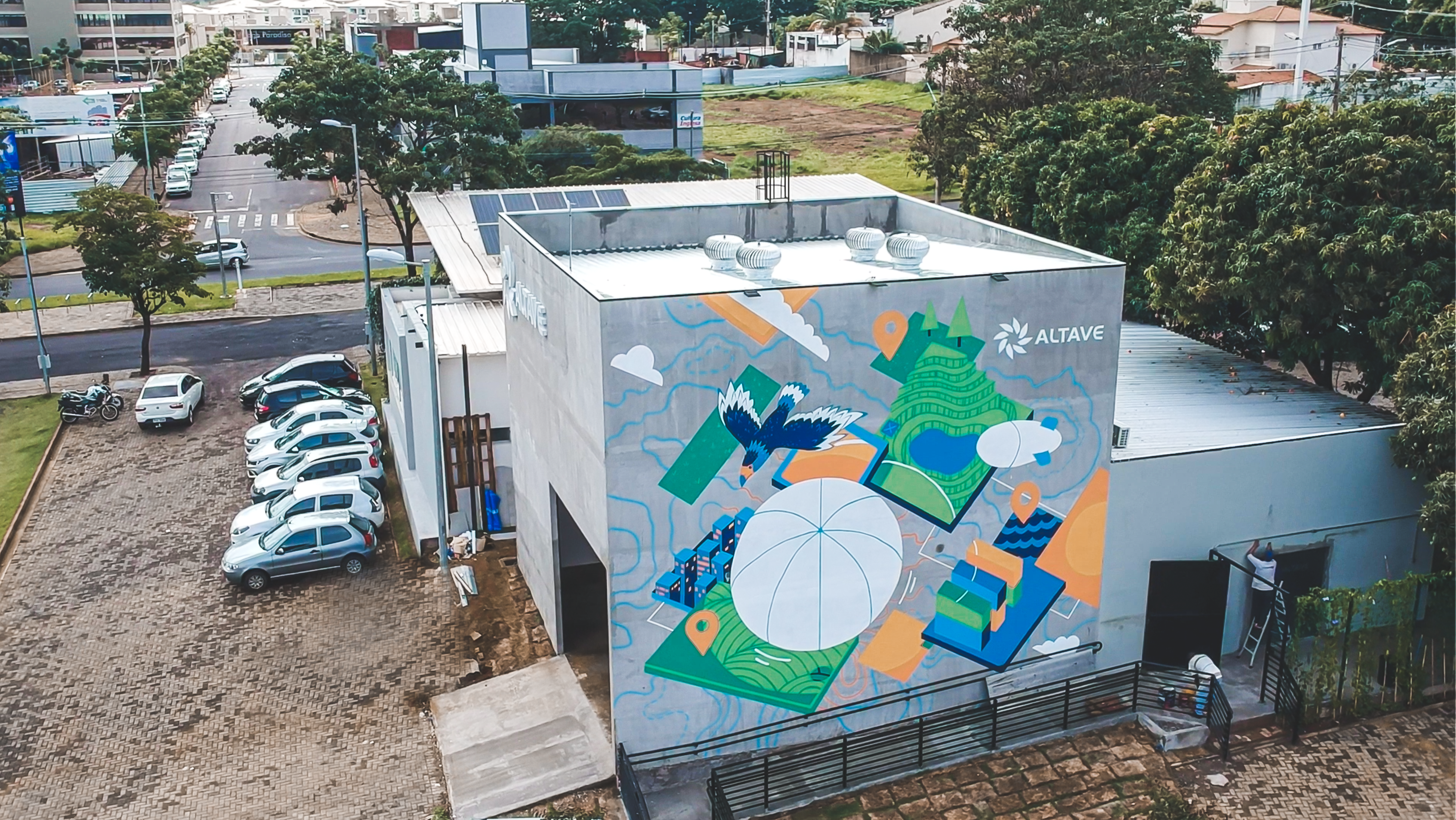 Sede da ALTAVE em Uberlândia